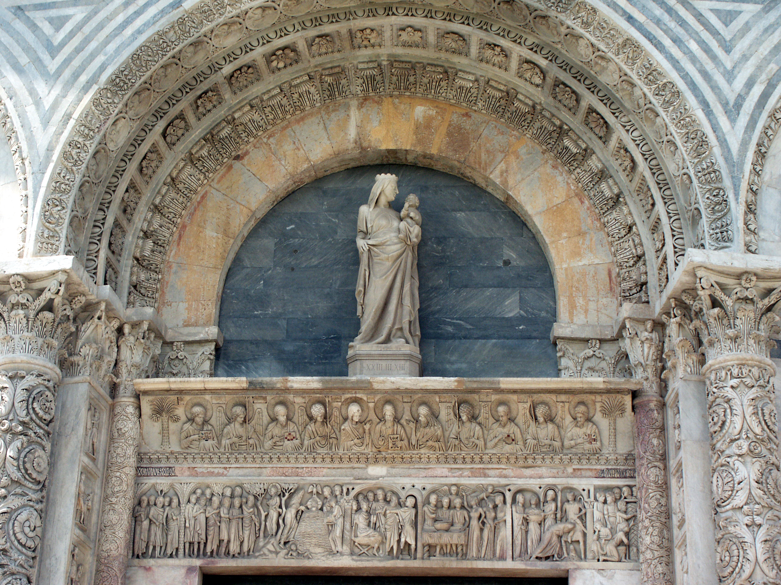 Tympan du Baptistère de Pise